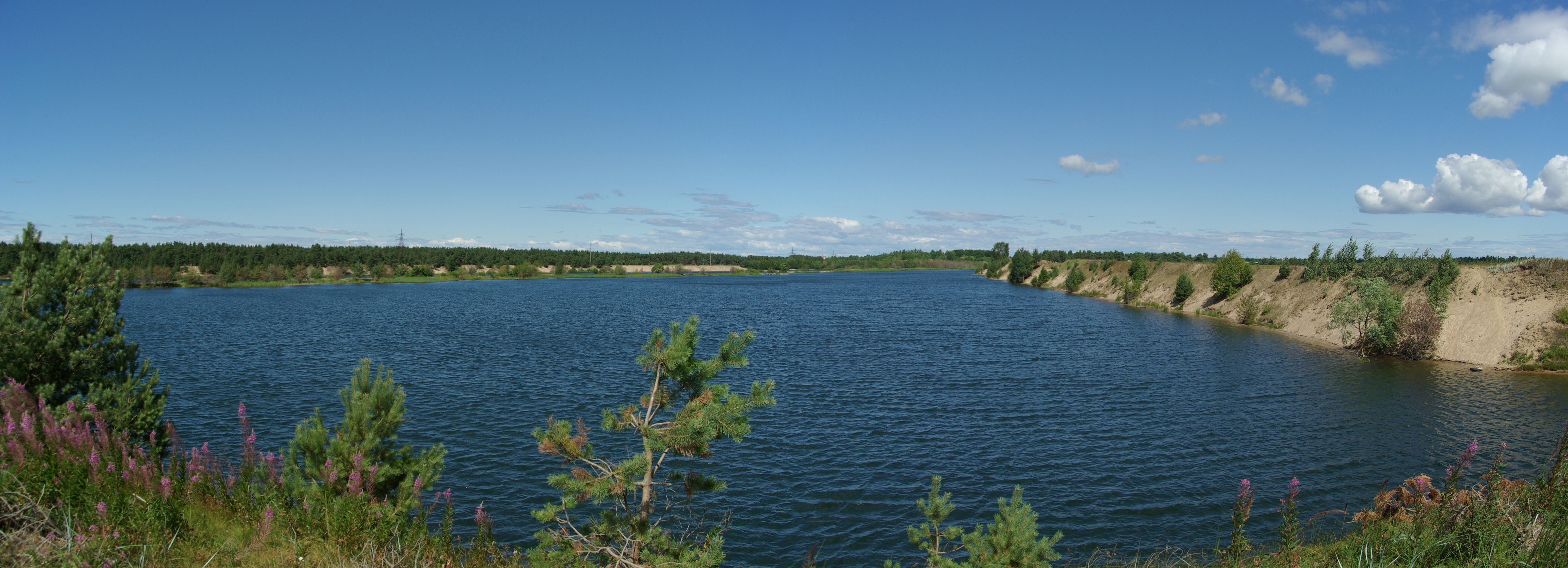 Harjumaal, Saku valla Männiku küla ning Tallinna linna Nõmme linnaosa juures asuv tehisjärv